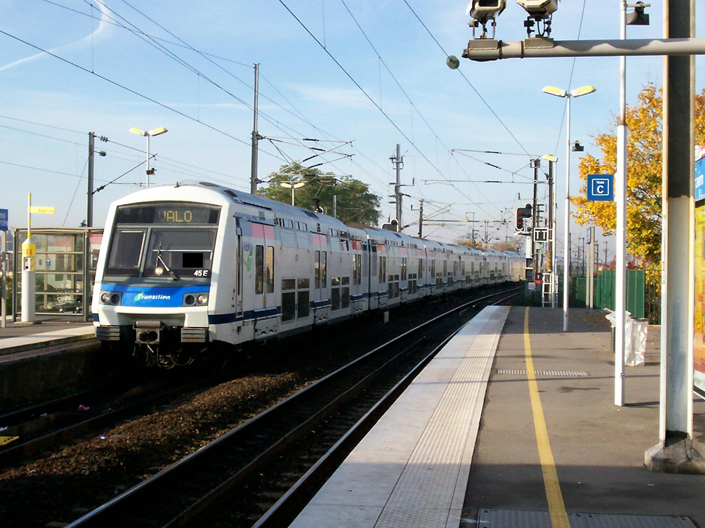 Rame MI2N arrviant en gare terminus de Villiers-sur-Marne Le Plessis-Trévise